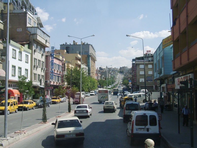 Large Street in Gaziantep